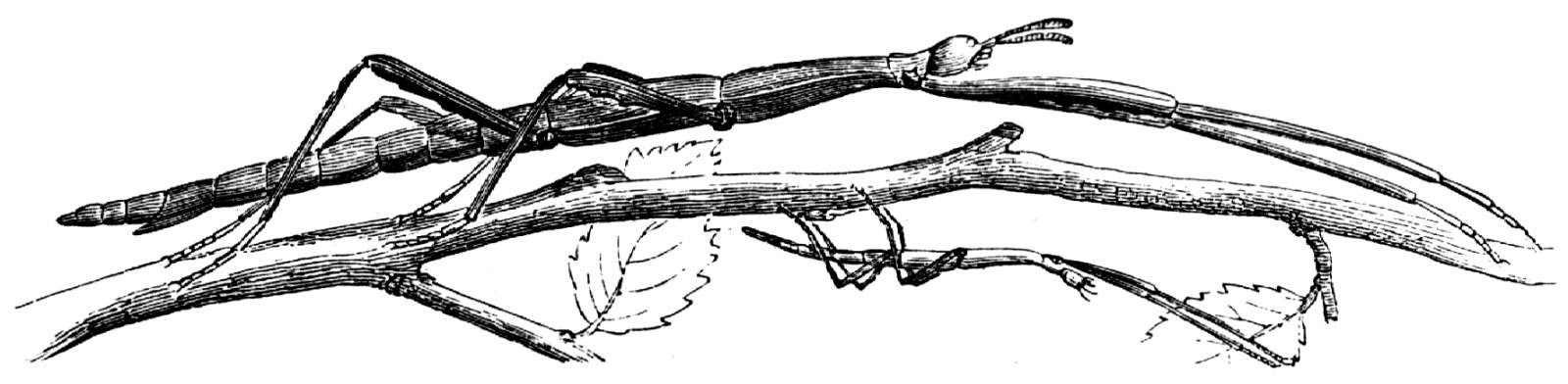 Rossi's Gespenstschrecke (Bacillus Rossi), erwachsen und als Larve. / Mittelmeerstabschrecke (Bacillus rossius)